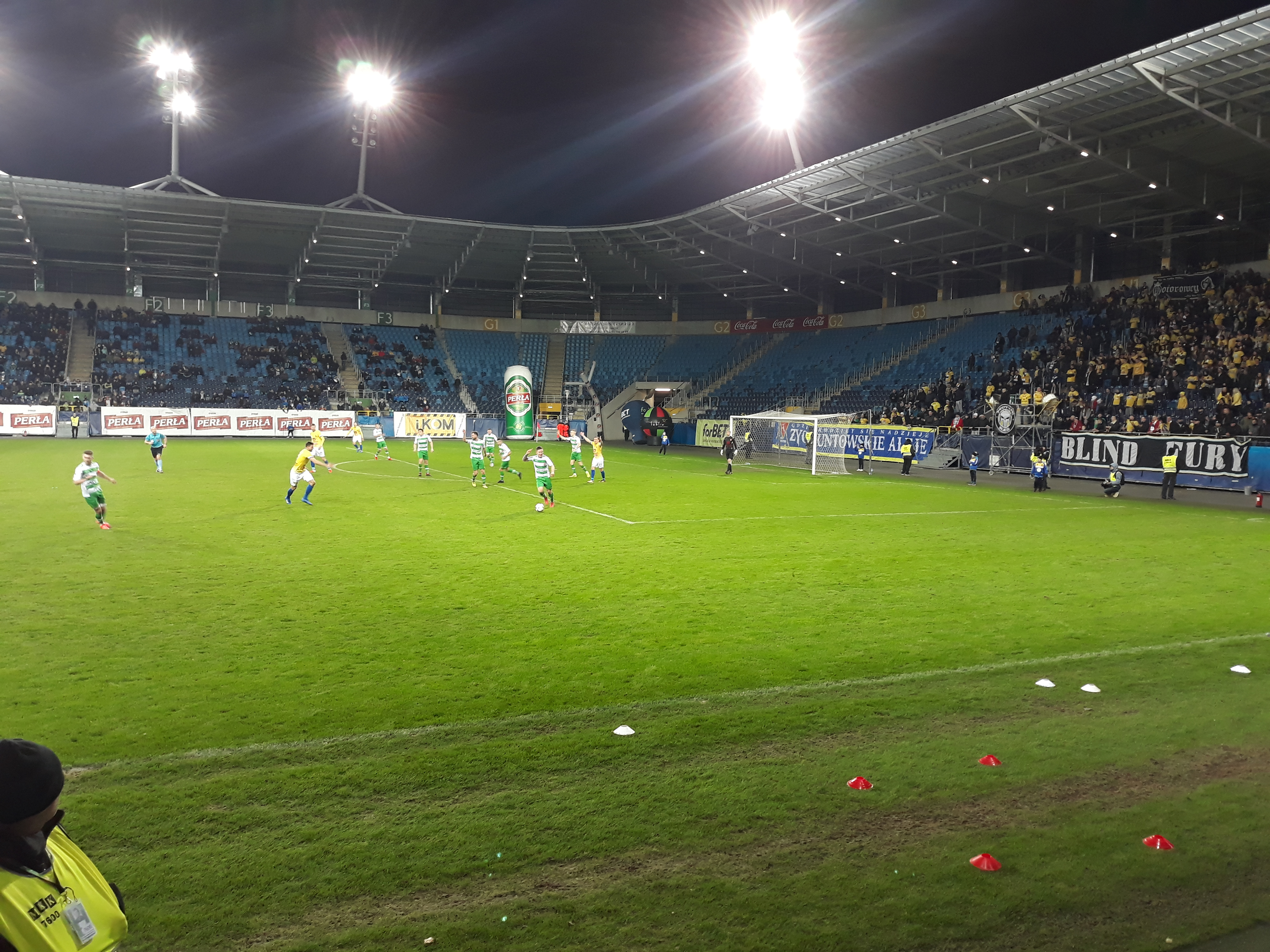 Motor Lublin – Orlęta Radzyń Podlaski 9.03.2019